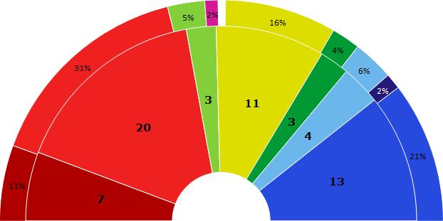 Mandatfördelning 2018-2022 Vänster-Höger Vänsterpartiet: 7 mandat Socialdemokraterna: 20 mandat Miljöpartiet: 3 mandat Sverigedemokraterna: 11 mandat Centerpartiet: 3 mandat Liberalerna: 4 mandat Moderaterna: 13 mandat